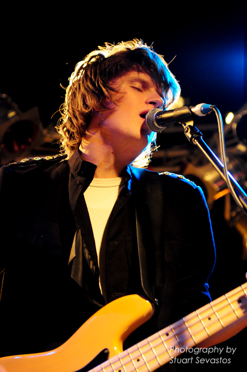 Harlequin League @ Amplifier Bar (11/7/2009)